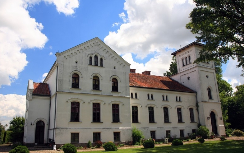 Osieka – wieś w woj. warmińsko-mazurskim, w powiecie bartoszyckim, w gminie Bartoszyce